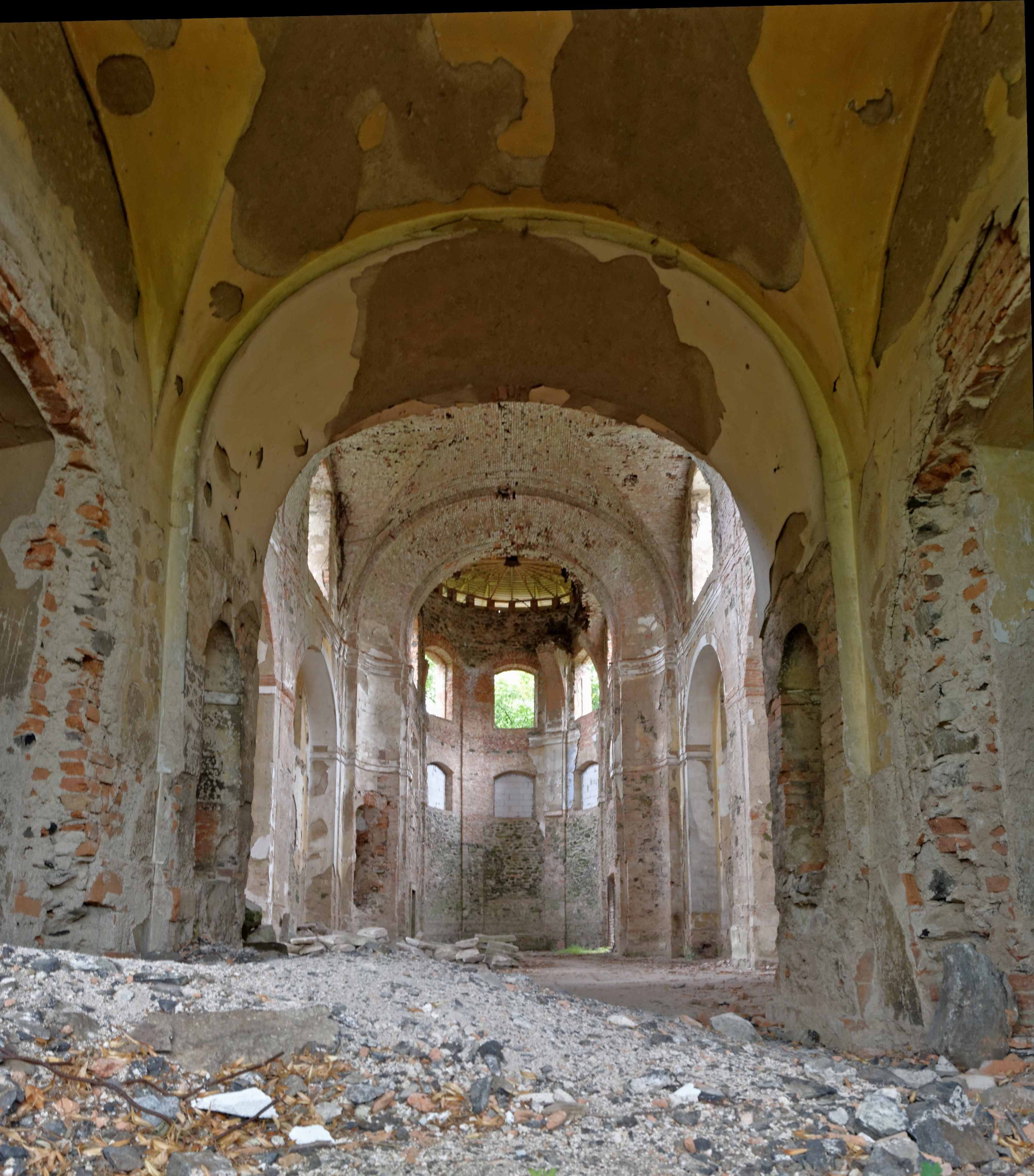 Kostel Nanebevzetí Panny Marien ve Svatoboru (Zwetbau). Pohled západním vstupem do lodi.